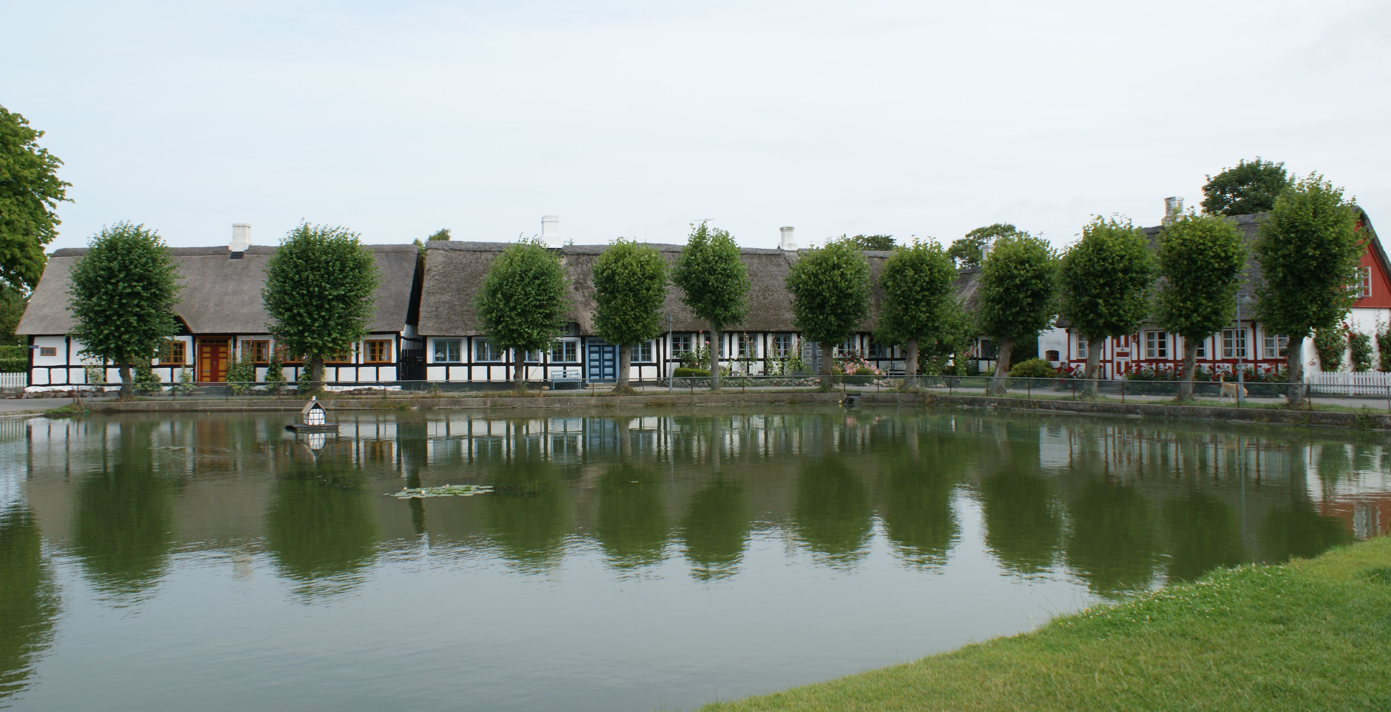 Nordby